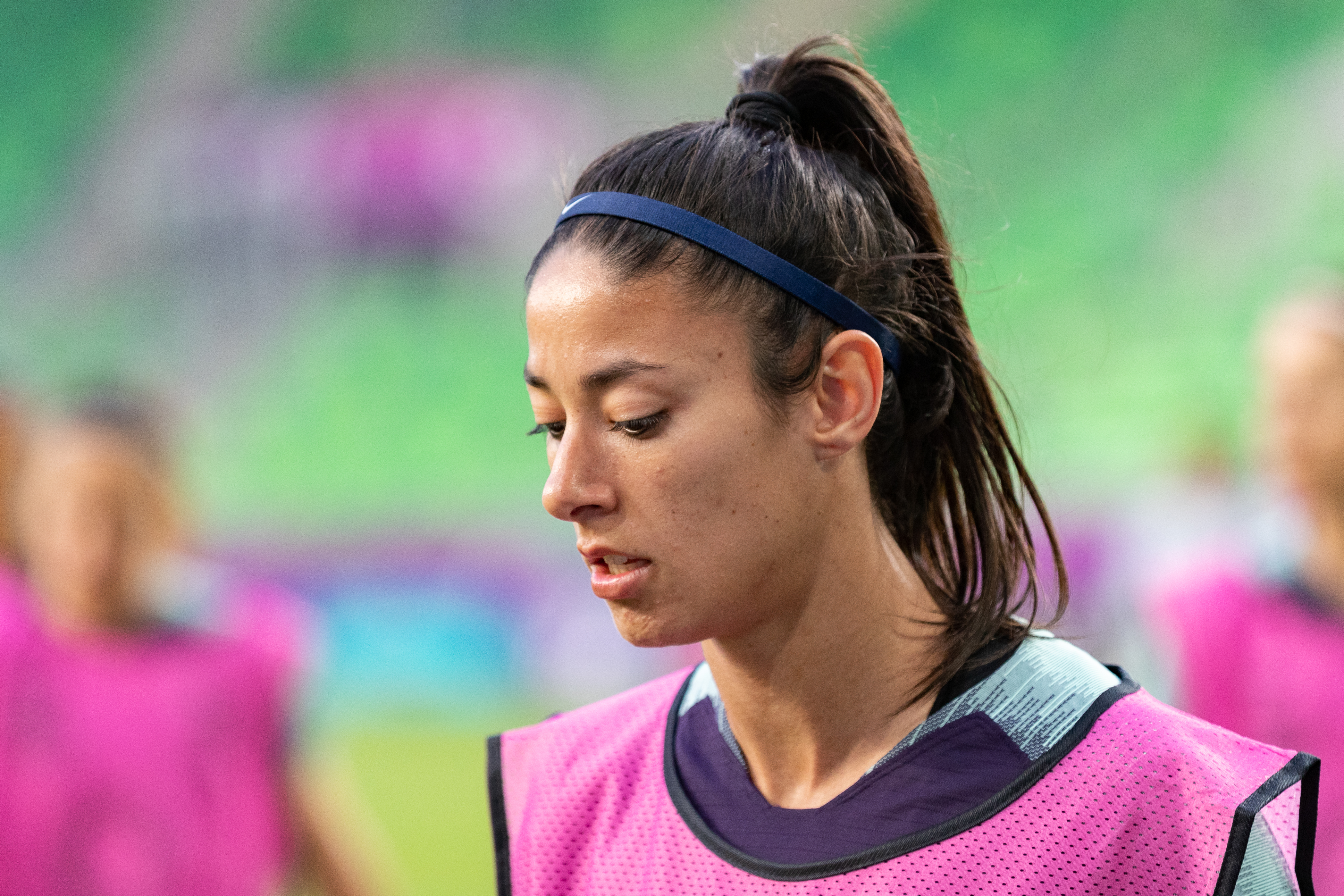 Leila Ouahabi (FC Barcelona, 15) beim Abschlusstraining